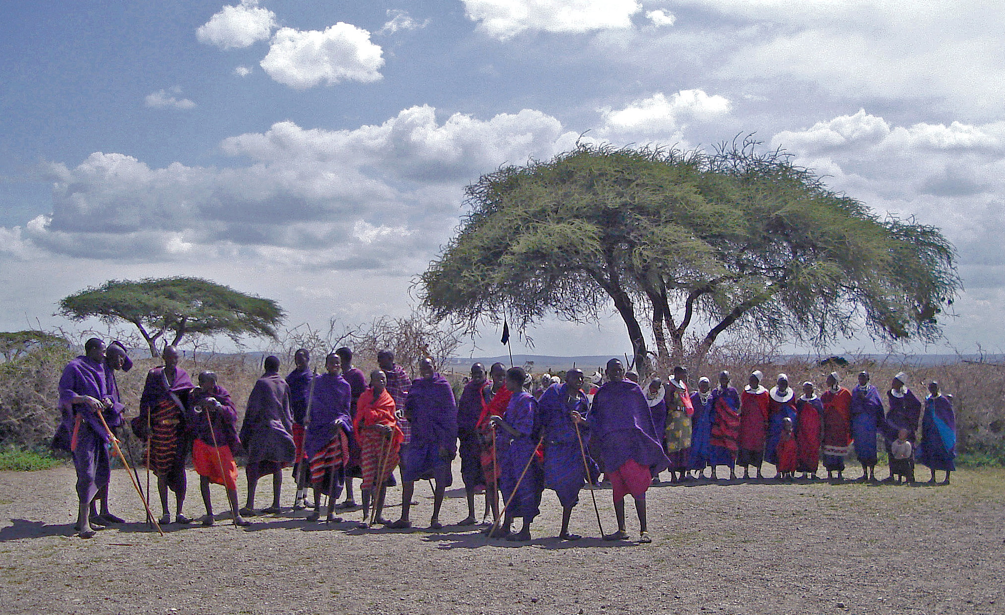 Masai village